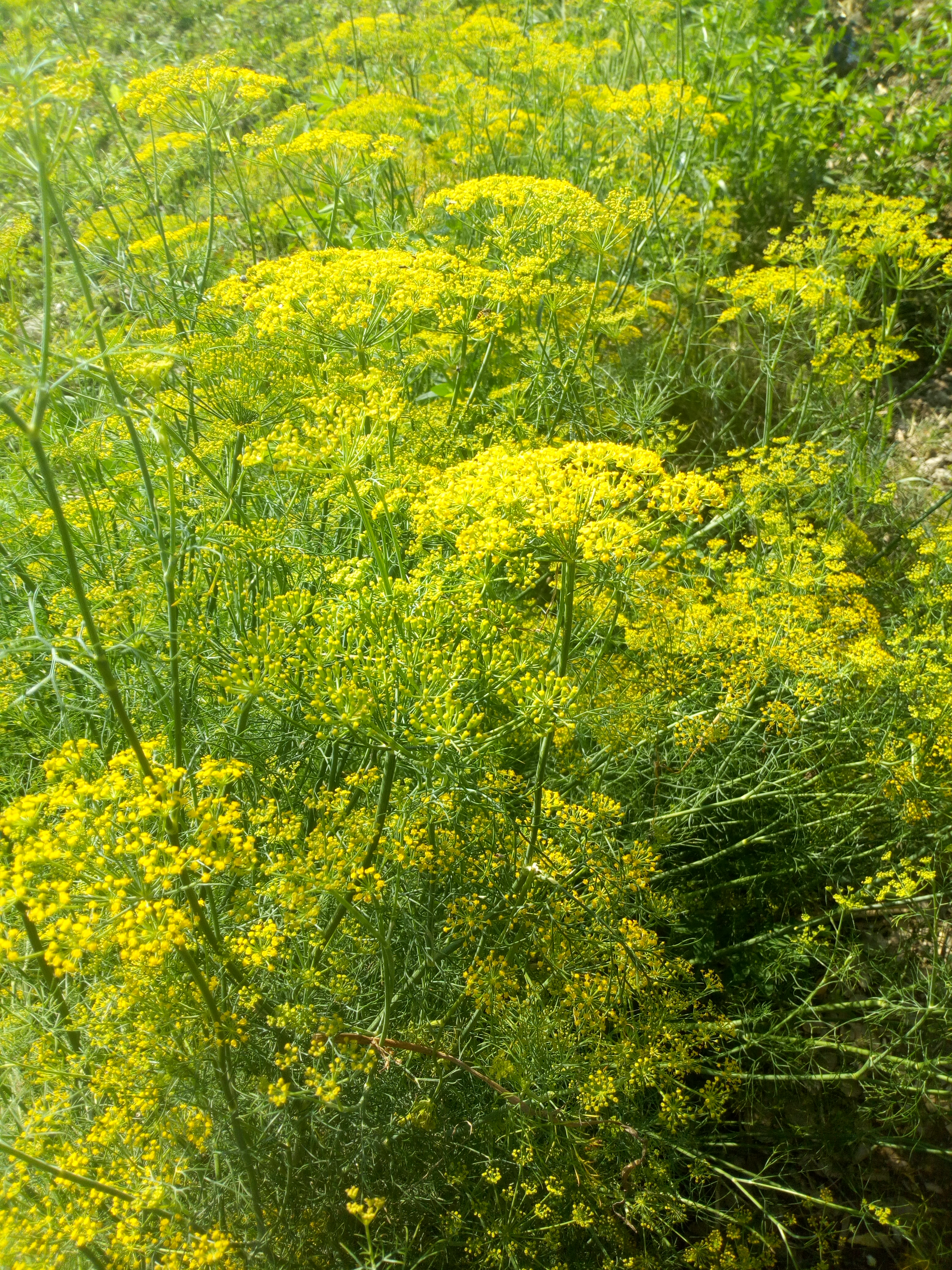 سنڌي: سنڌ جو گُل